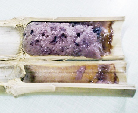 Khao lam ข้าวหลาม riz gluant cuit avec du lait de noix de coco dans un tube de bambou thailand